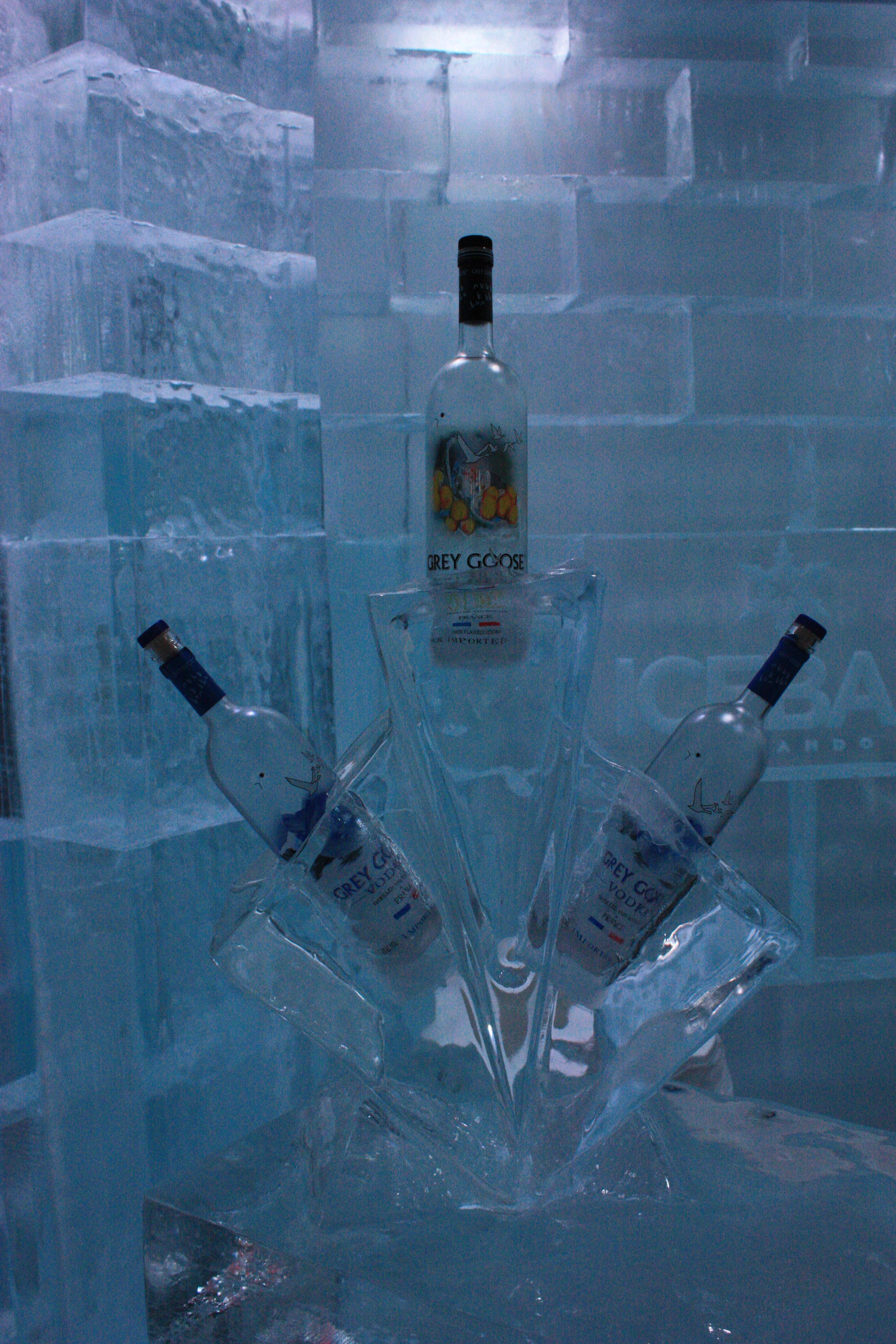 Vodka in an ice sculpture at Icebar Orlando